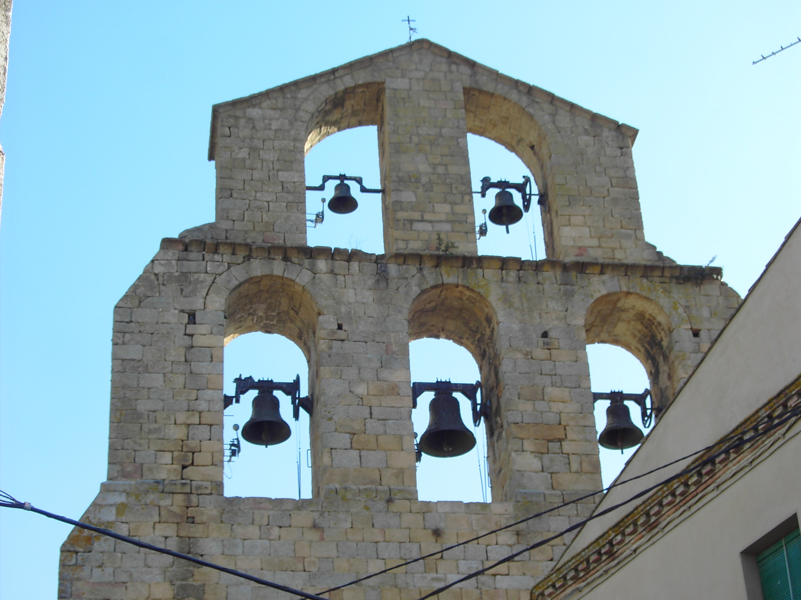 Espadaña con 5 ojos en la iglesia de Santa María en Agullana (Alto Ampurdán, Gerona).